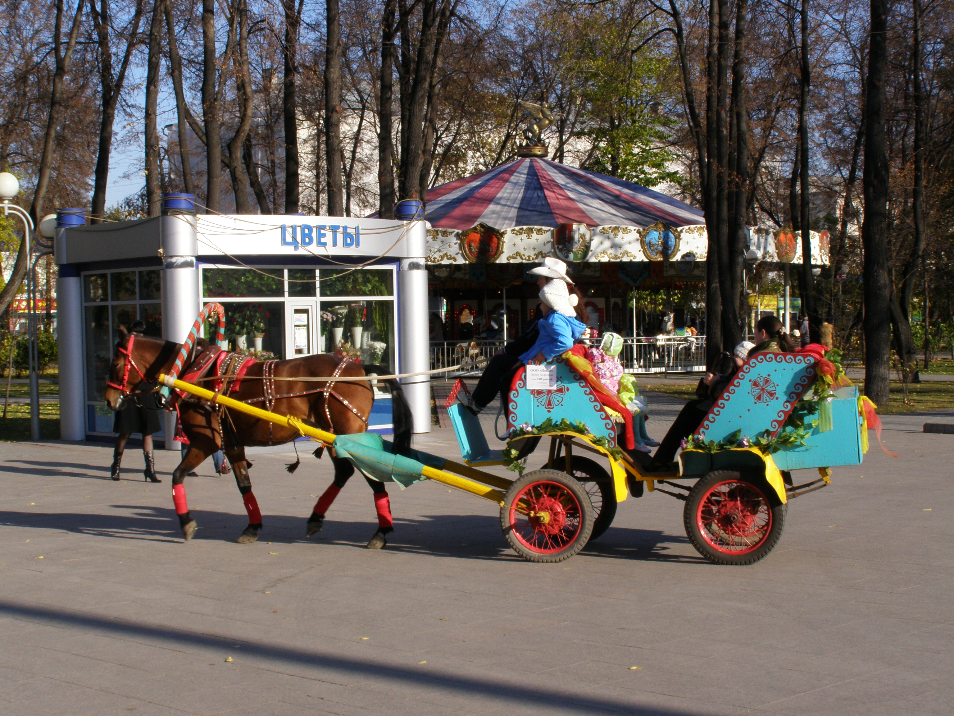 Infanoj en ĉaro. Tjumeno, Rusio.